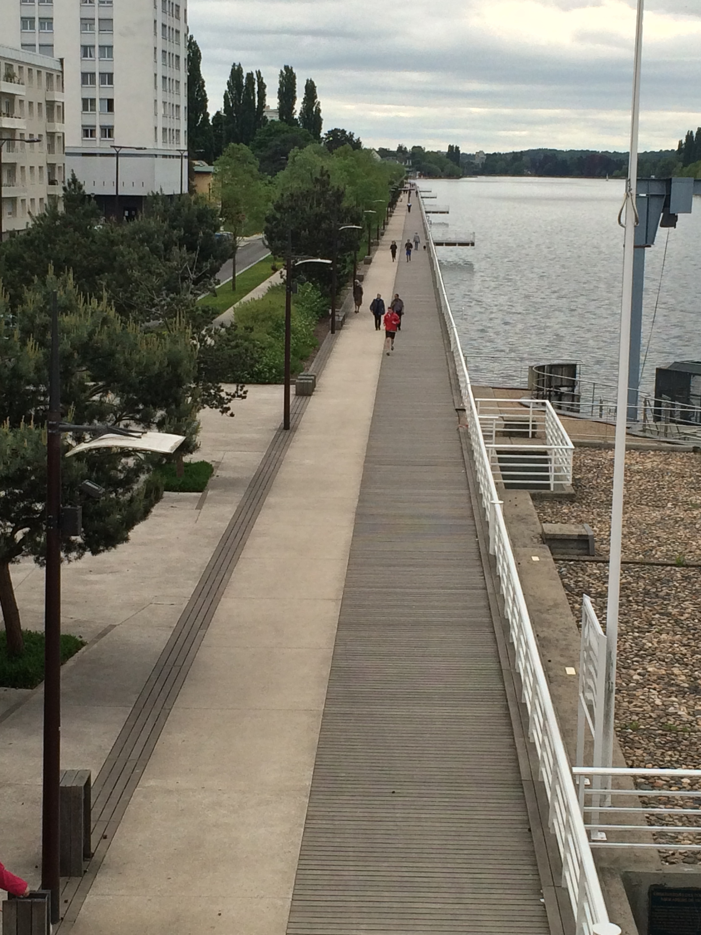 la Coté droite (ou Est) de la rivière de l'Allier en Mai 2014 à Vichy (France)